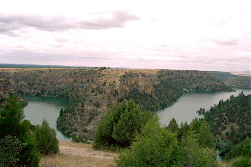 Meandro de las Hoces del río Duratón en la ermita de San Frutos. (Provincia de Segovia, España) Tomada por --JMSE el 2 de Julio de 2003 y cedida a Wikipedia.